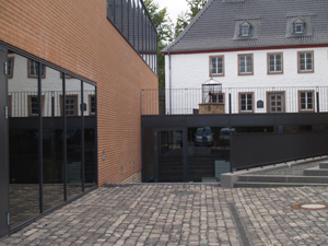 Links das neue "Museum der Badekulturen" in Zülpich, im Hintergrund das alte Museum